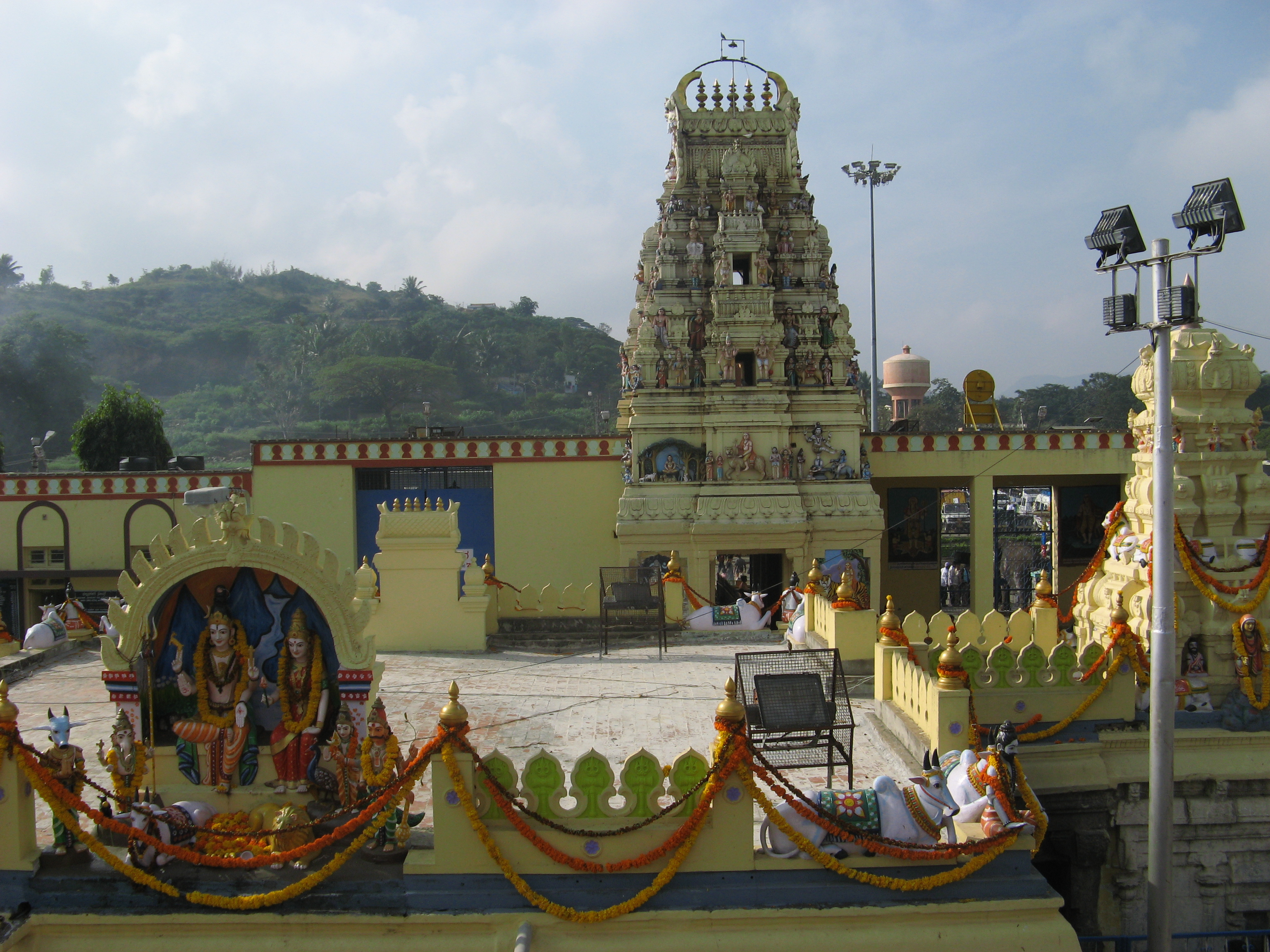 ಕನ್ನಡ: ಶ್ರೀ ಮಲೆ ಮಹದೇಶ್ವರ - ಗರ್ಭಗುಡಿ